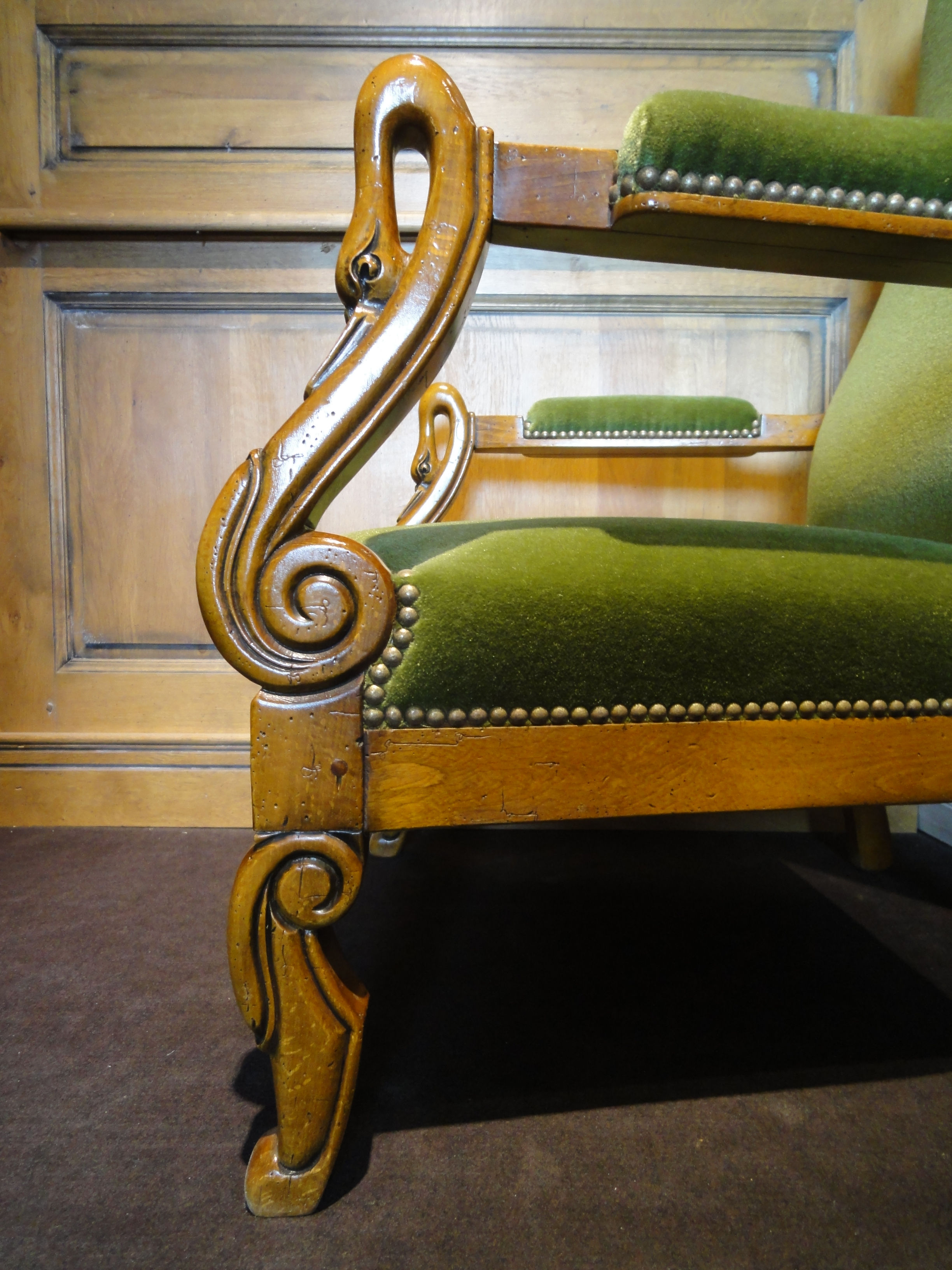 Style premier empire, réalisé par les Ateliers Allot Frères.